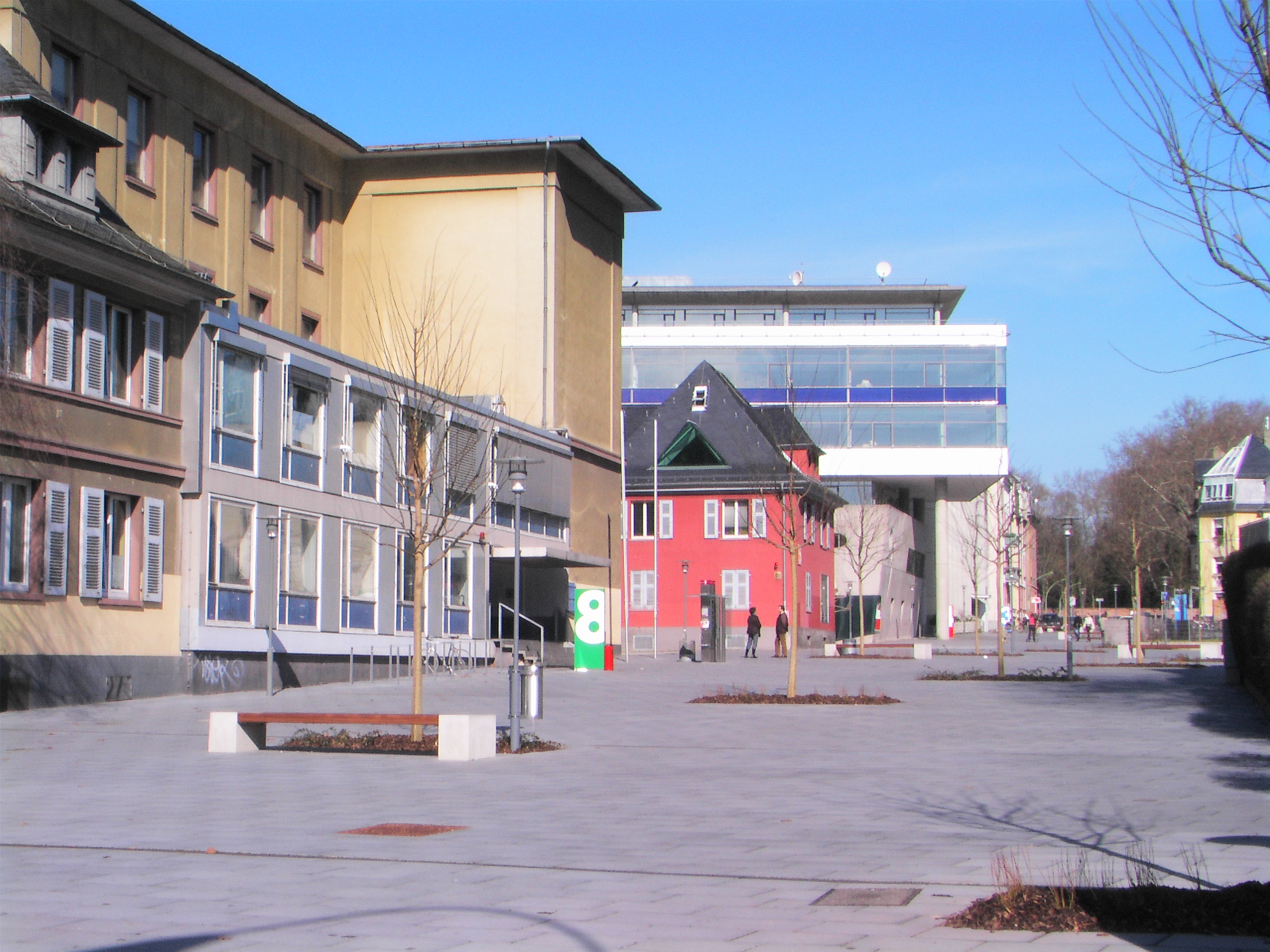 Fachhochschule Frankfurt am Main, Gebäude 8, 5 und 4 (von vorne nach hinten) und Campus. Ehemalige Kleiststraße.